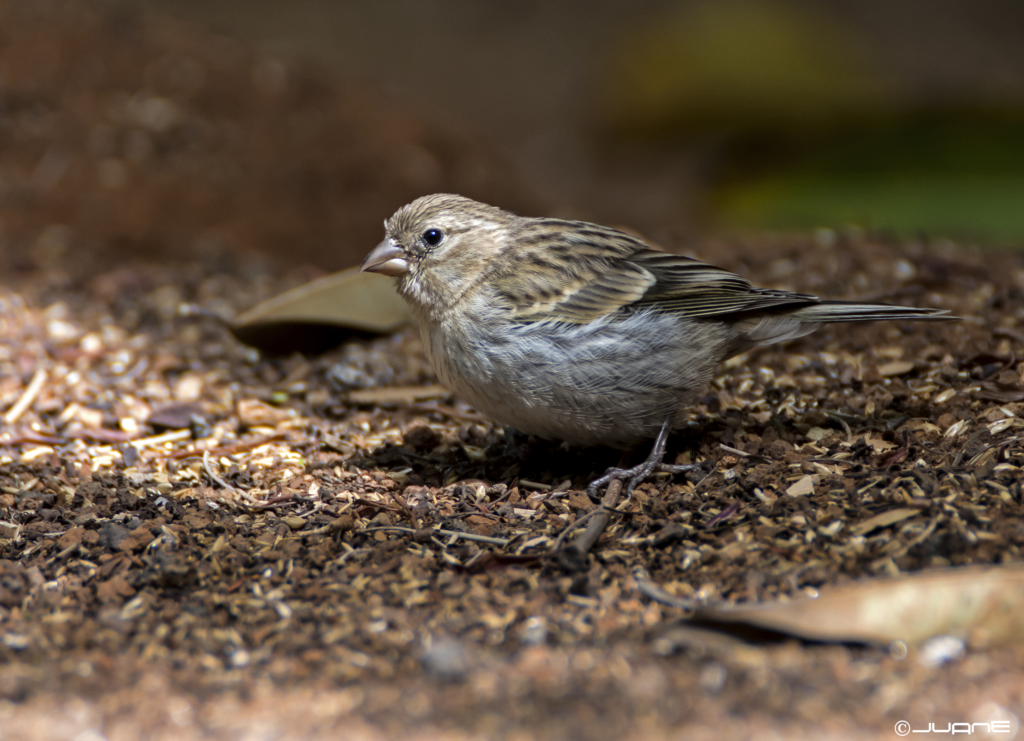 Sigma 120-300 f2.8 + TCx1.4